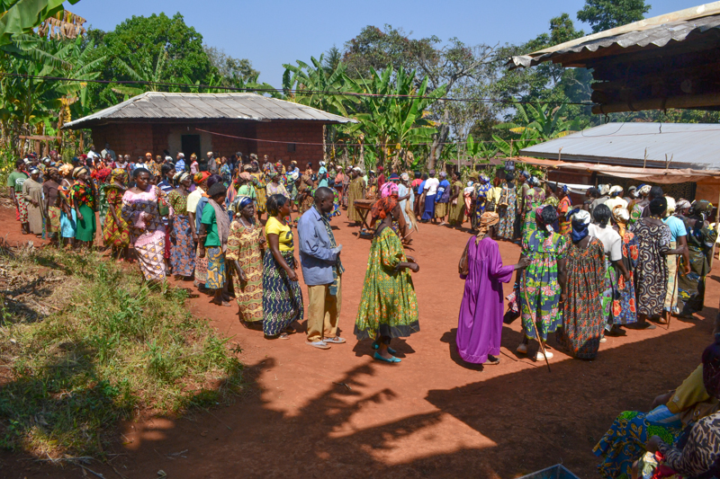 A Bamougong comme chez les bamilékés en général tout ne s'achève pas avec les obsèques. Il y a les funérailles pour un ultime hommage.